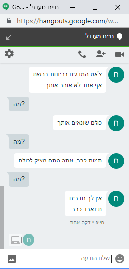 צ'אט המדגים בריונות ברשת באמצעות הצ'אט המובנה של Gmail